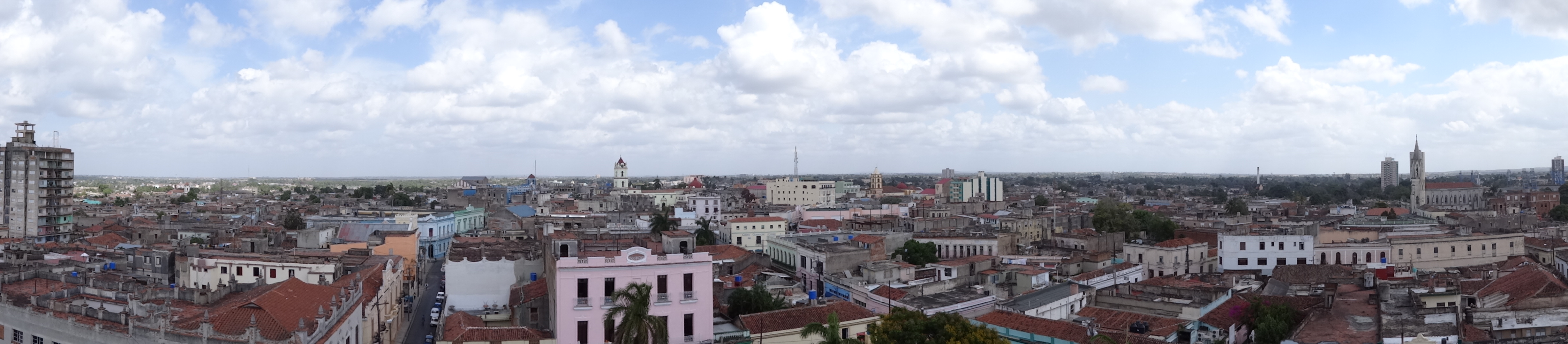 Widok na Camaguey, Kuba